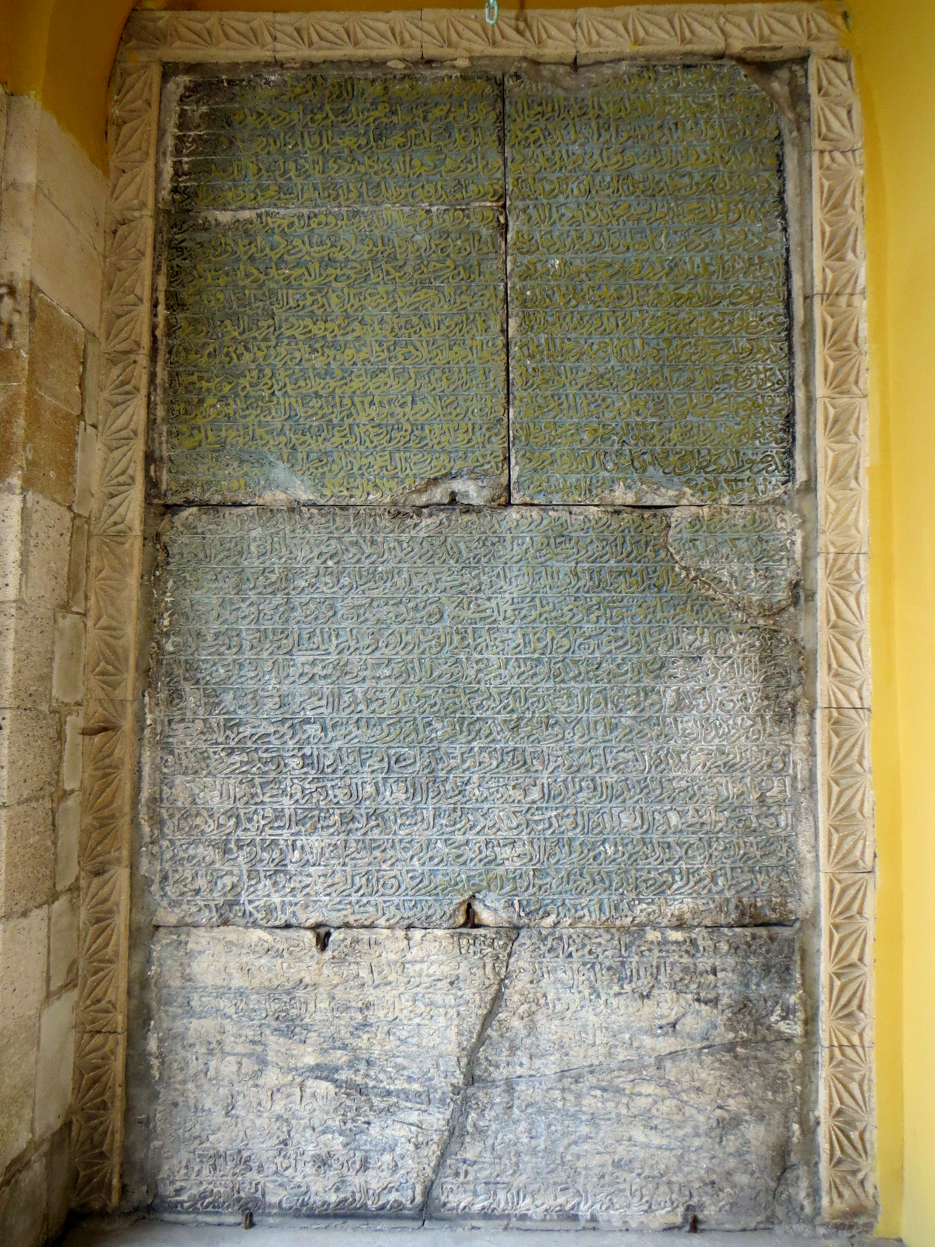 Taş Vakfiye, Kütahya.